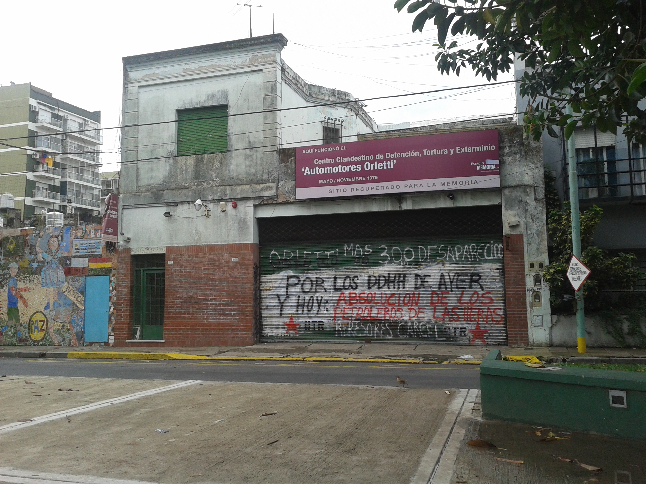 Lugar donde funcionaba el Centro Clandestino de Detención durante la última dictadura militar, conocido como "Automotores Orletti". Gral. Venancio Flores 3519, Buenos Aires.